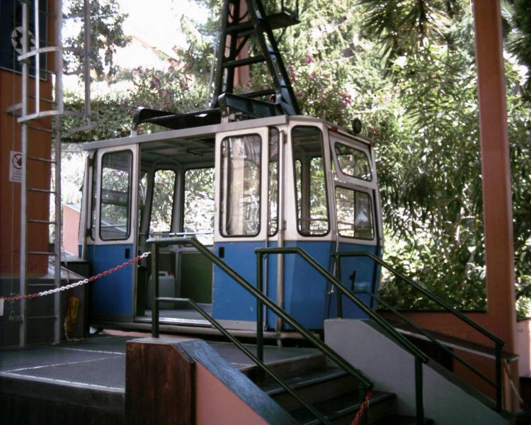 Cabina funivia Rapallo - Montallegro